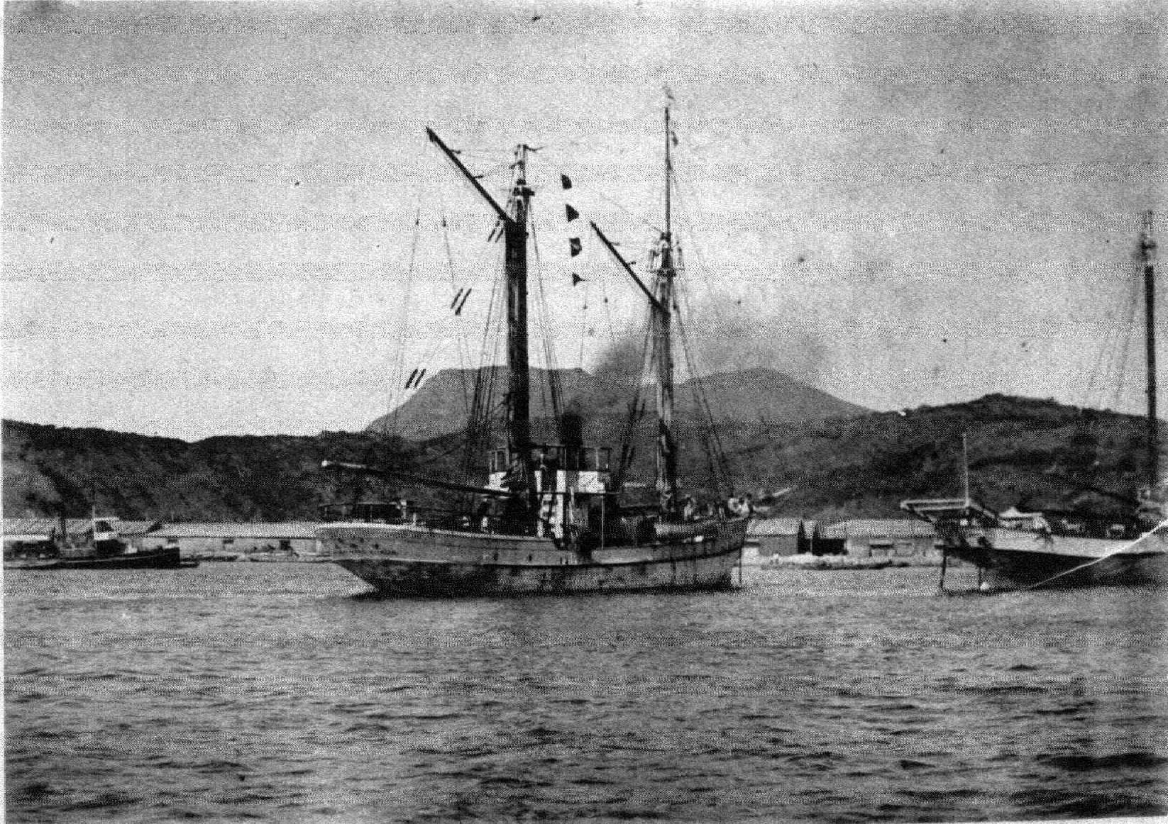 凌海丸是臺灣第一艘水產試驗船，1909年開始進行水產研究與試驗